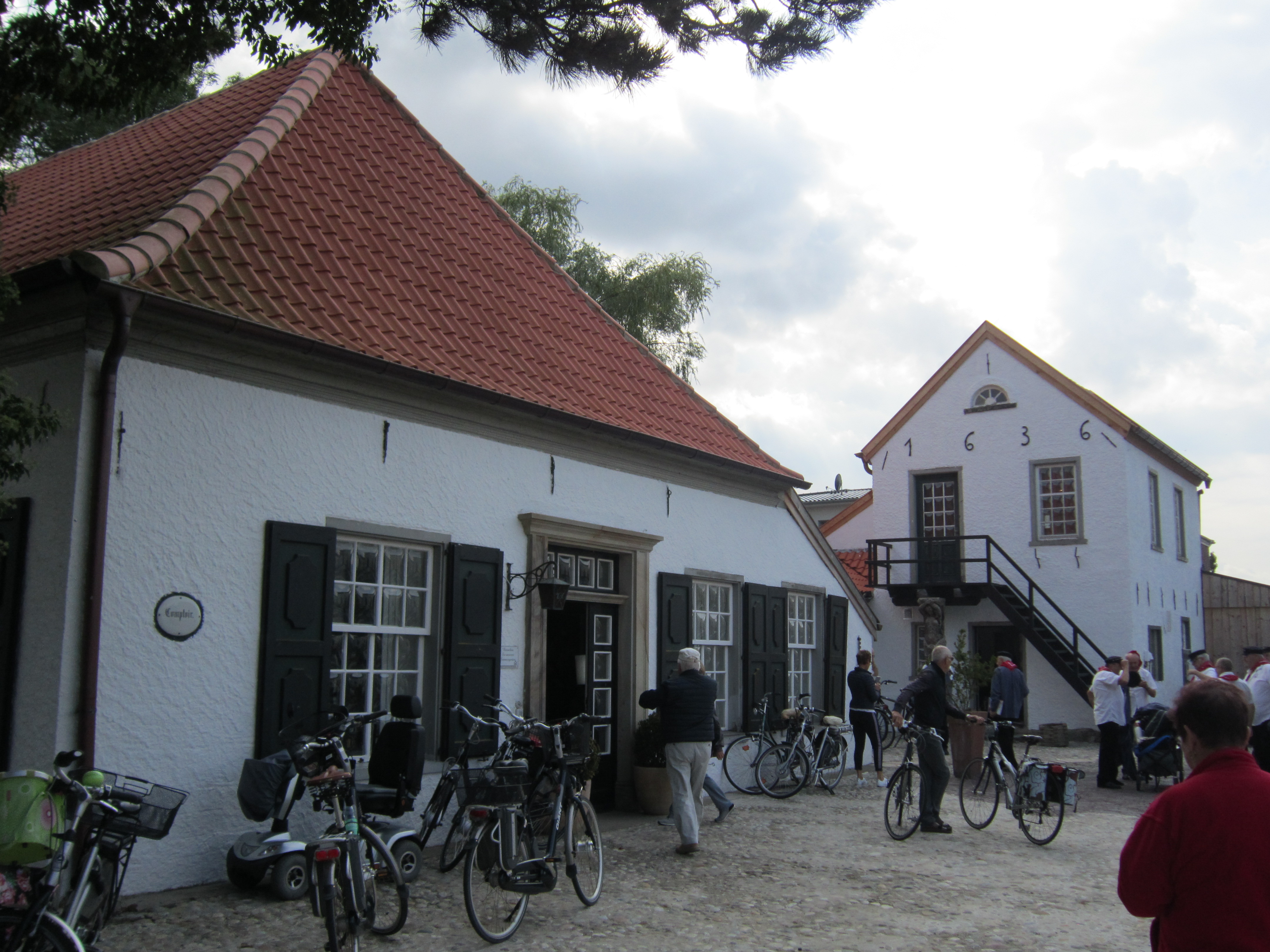 Heimatmuseum Alte Drostei Papenburg während des Hafenfestes 2018